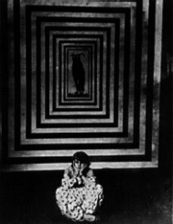 Foto di scena di Thaïs (1917), regia di Anton Giulio Bragaglia e Riccardo Cassano - produz "Novissima film" - Roma)